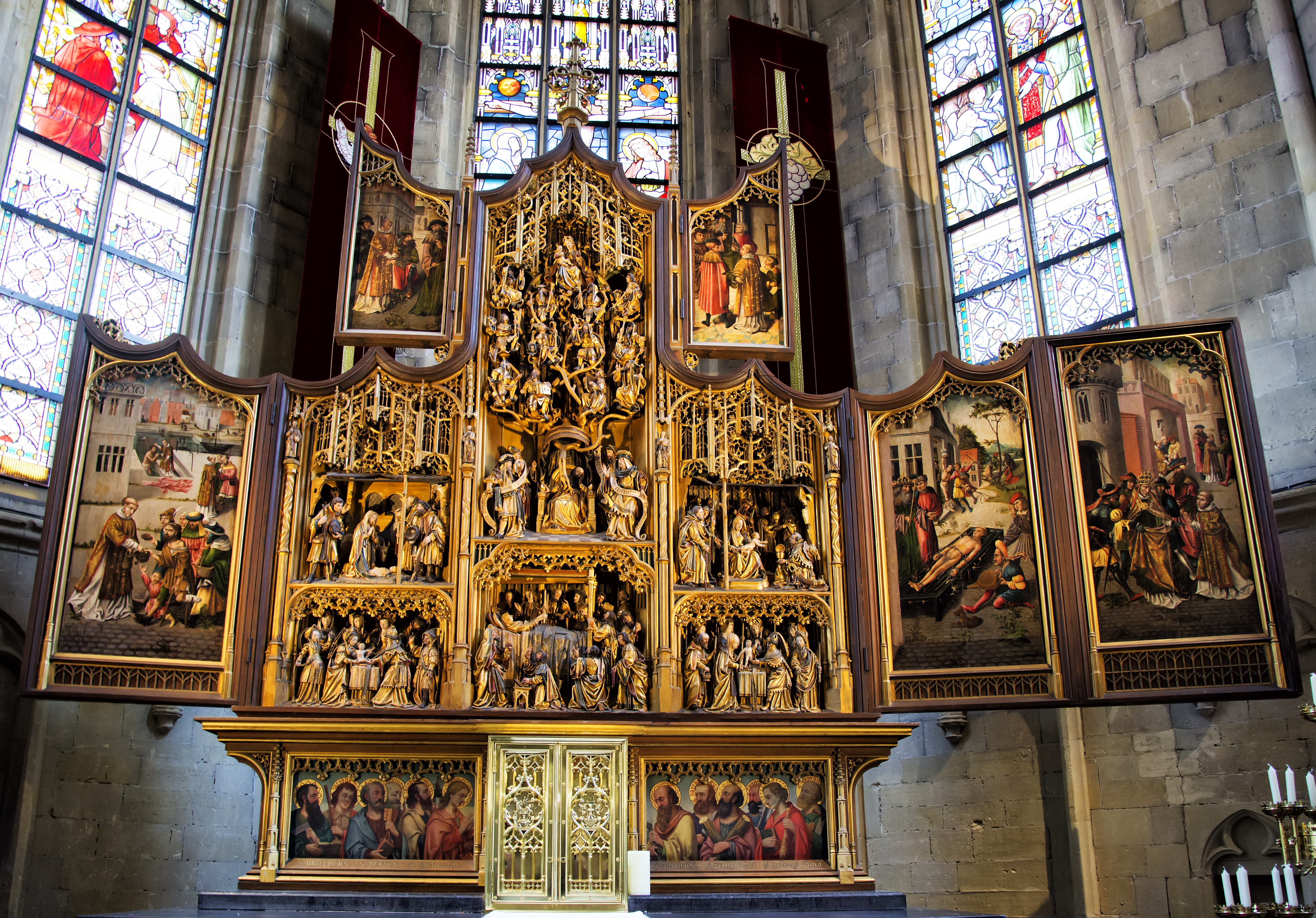 Mariaretabel Sint-Laurentiuskerk (Bocholt) 27 september 2019 This photo of movable heritage has been taken in the Flemish Region